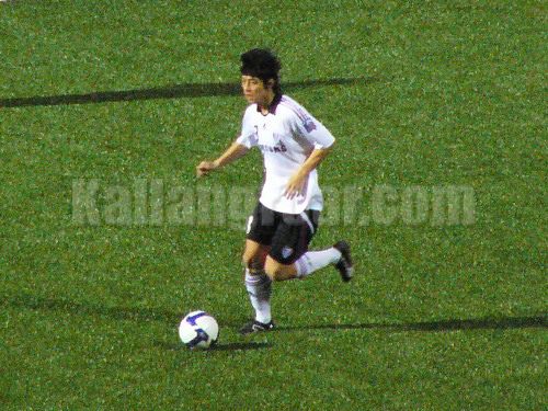 ACL 2009: SAFFC vs Suwon Samsung Bluewings, 18 March